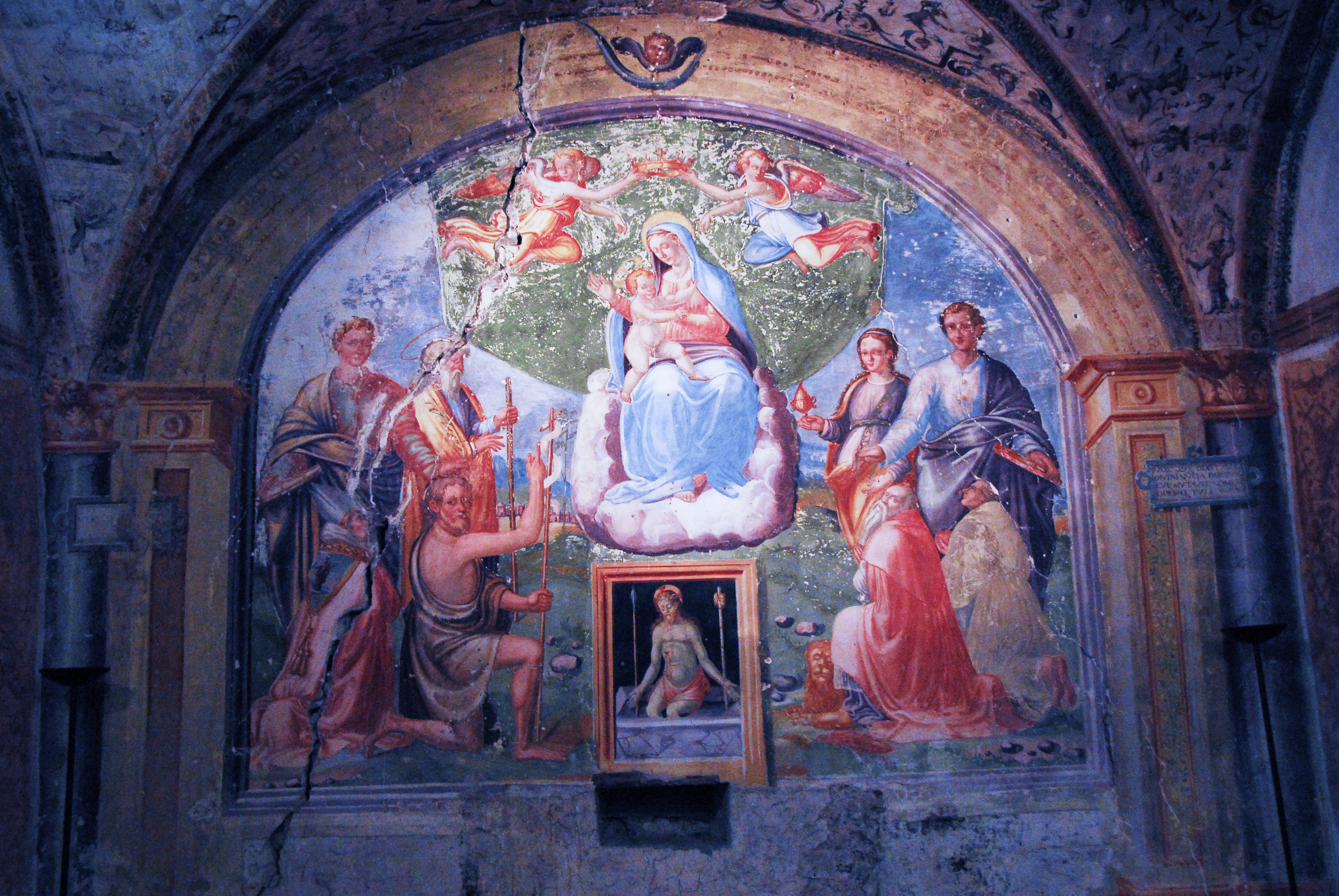 Chiesa dei SS Giovanni e Paolo - Spoleto